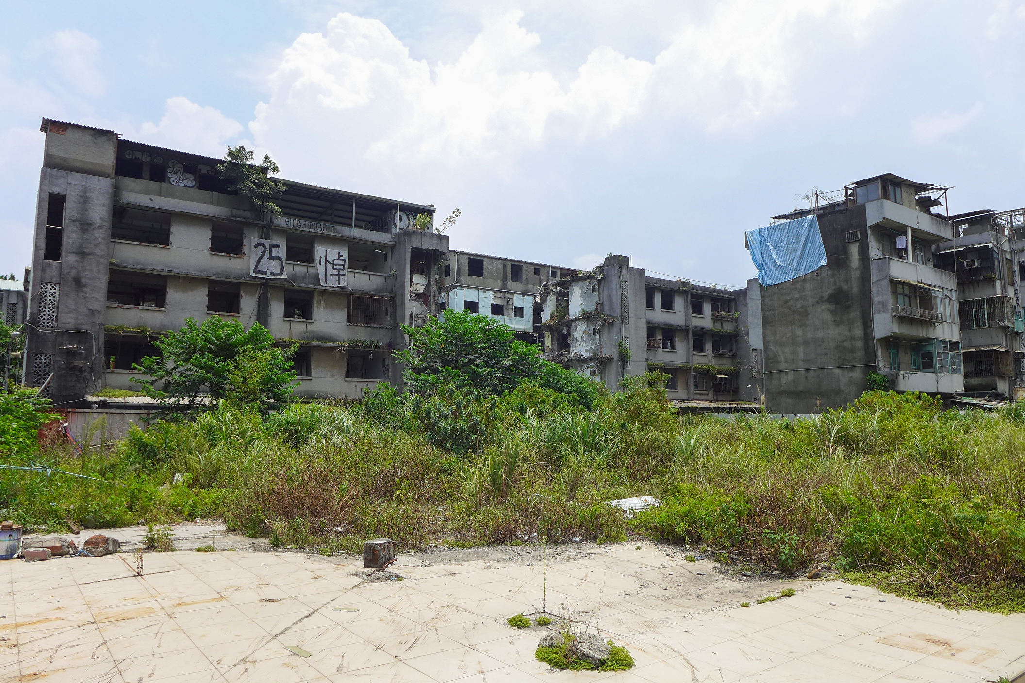 Q Square Level 1